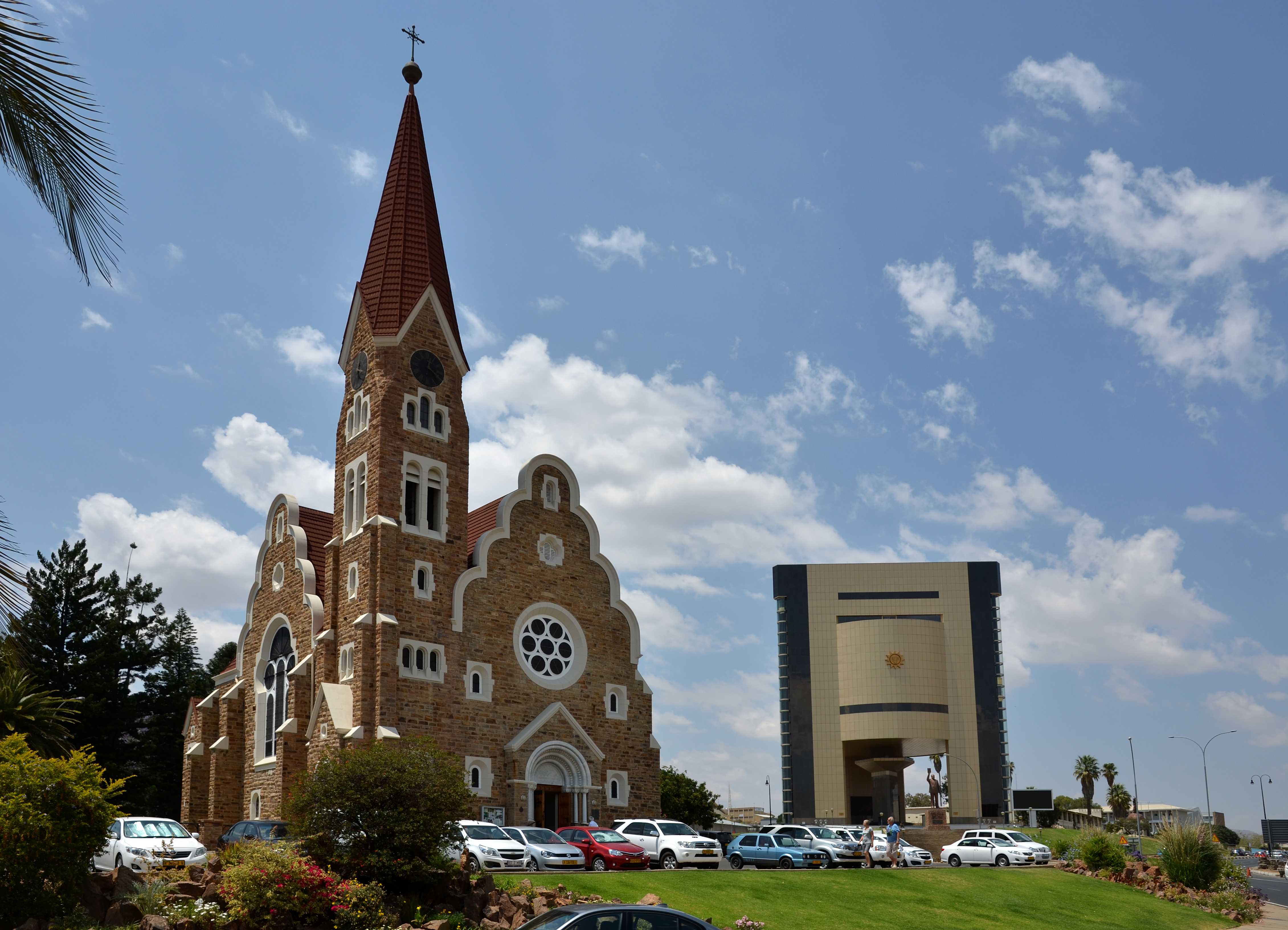 Christians Church, kostel v hlavním městě Windhoek - Namibie